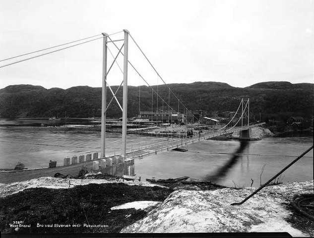 Elvenes Bridge in Sør-Varanger, Norway